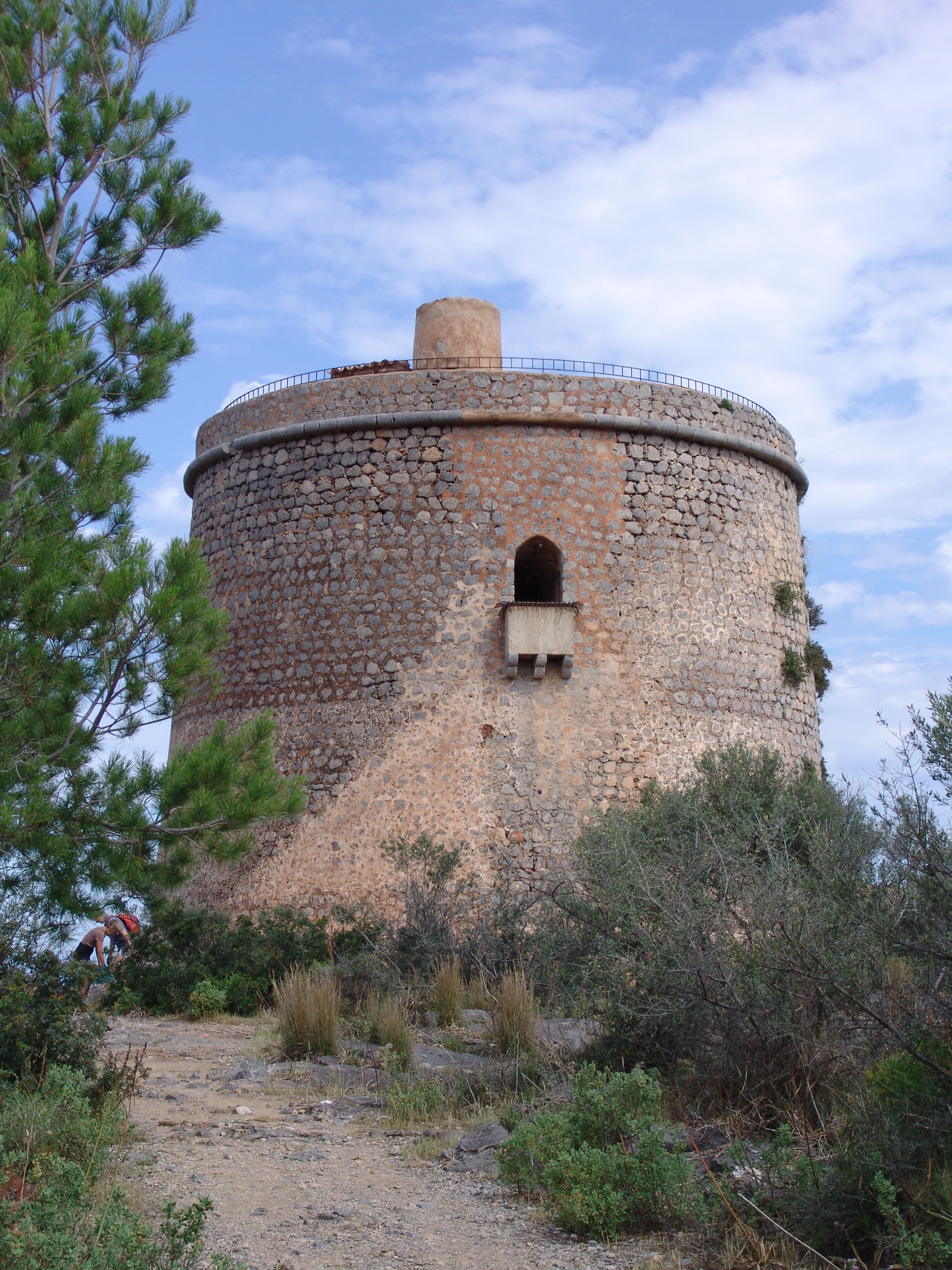 Turm bei Port de Sóller mit herrlicher Aussicht